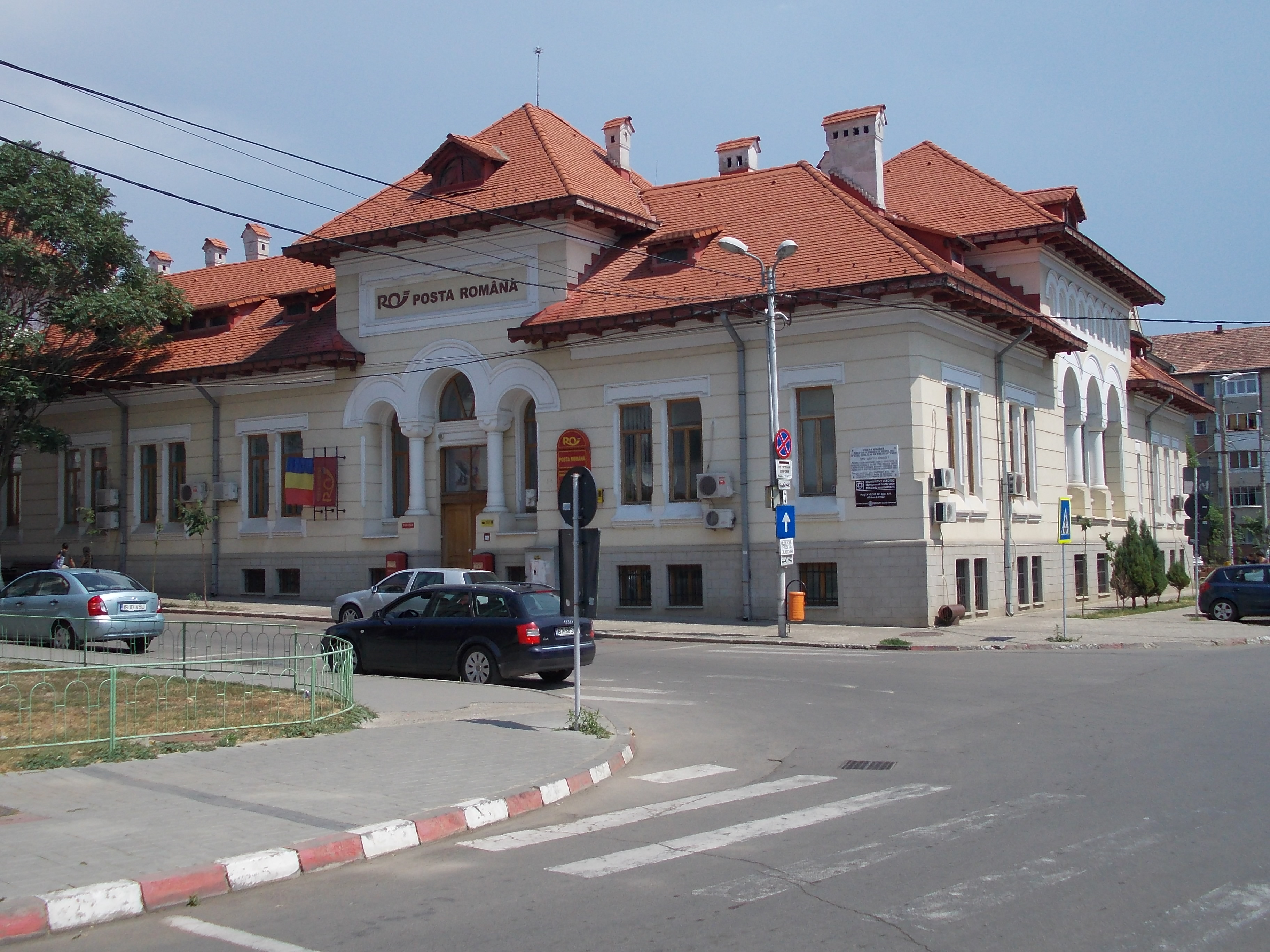 Poşta veche din Botoşani